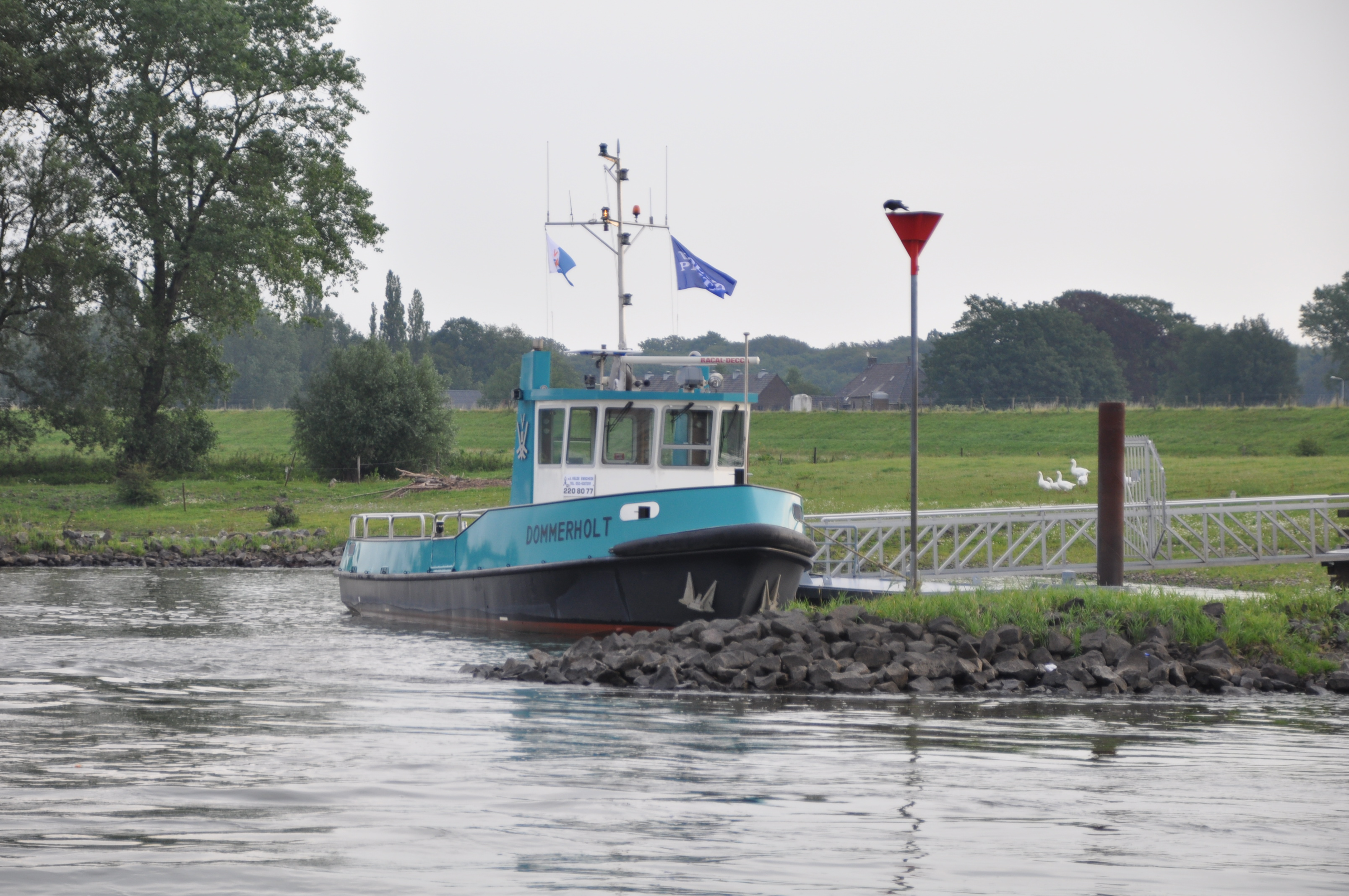 Het veer DOMMERHOLT tussen Wilp en Gorssel